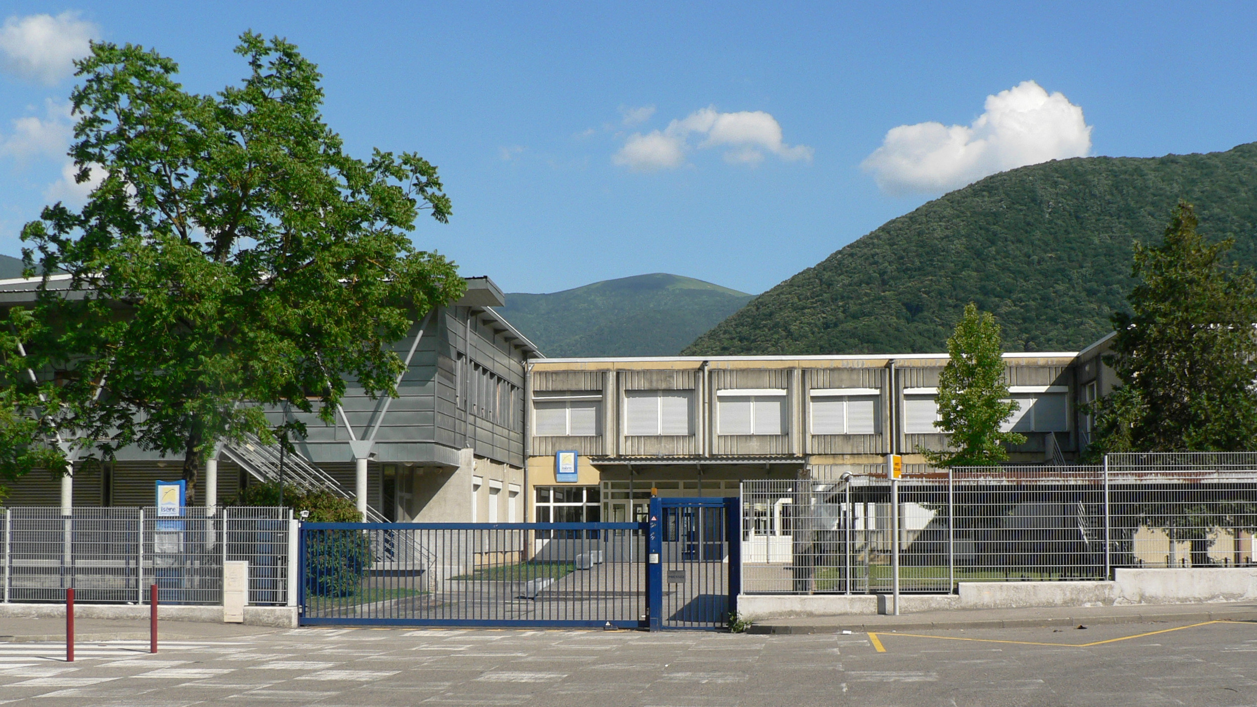 Collège Le Massegu à Vif (Isère)